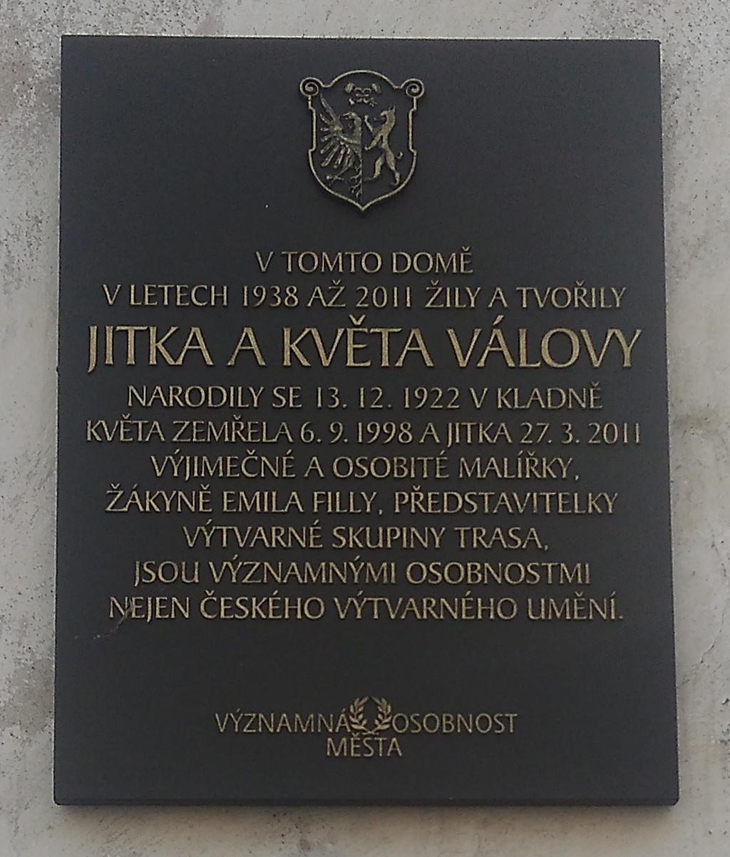 sestry Válovy, pamětní deska, Bendlova 1662 Kladno